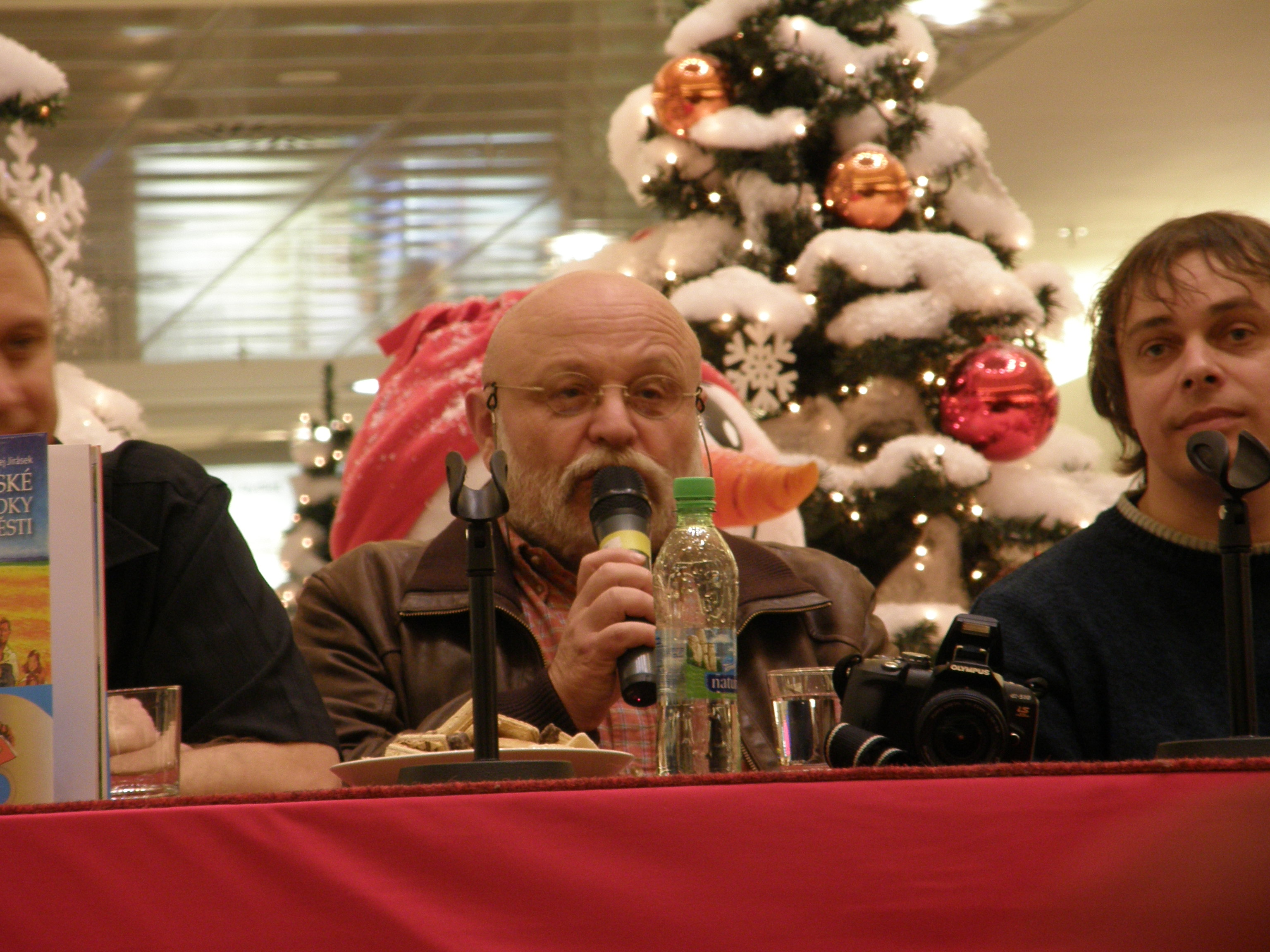 Arnošt Goldflam na autogramiádě ve Vaňkovce 1. 12. 2008